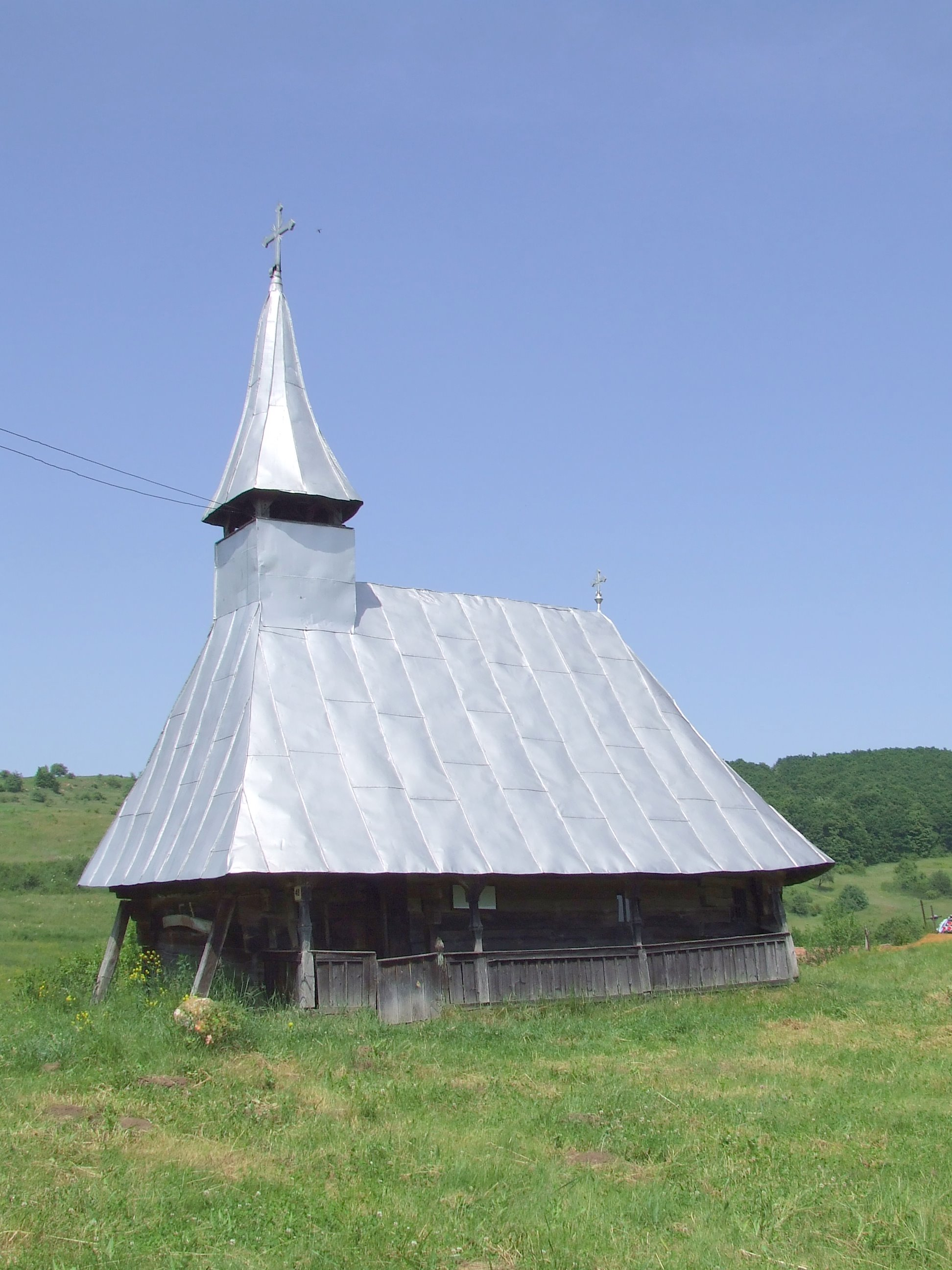 Biserica de lemn din Sumurducu